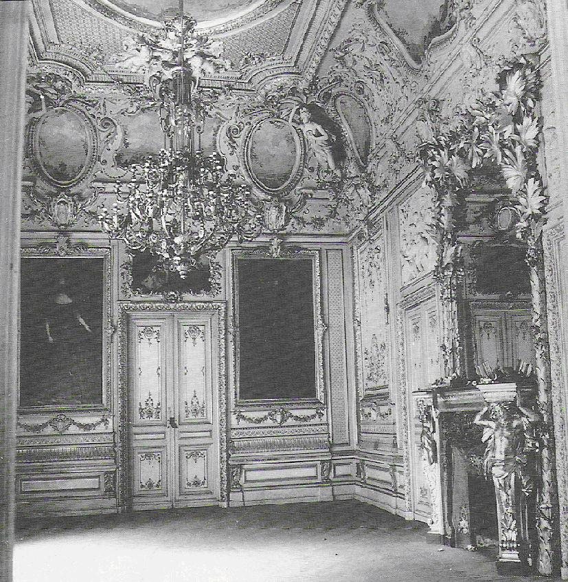 Sala balowa pałacu w Krowiarkach - zdjęcie z 1965 r.